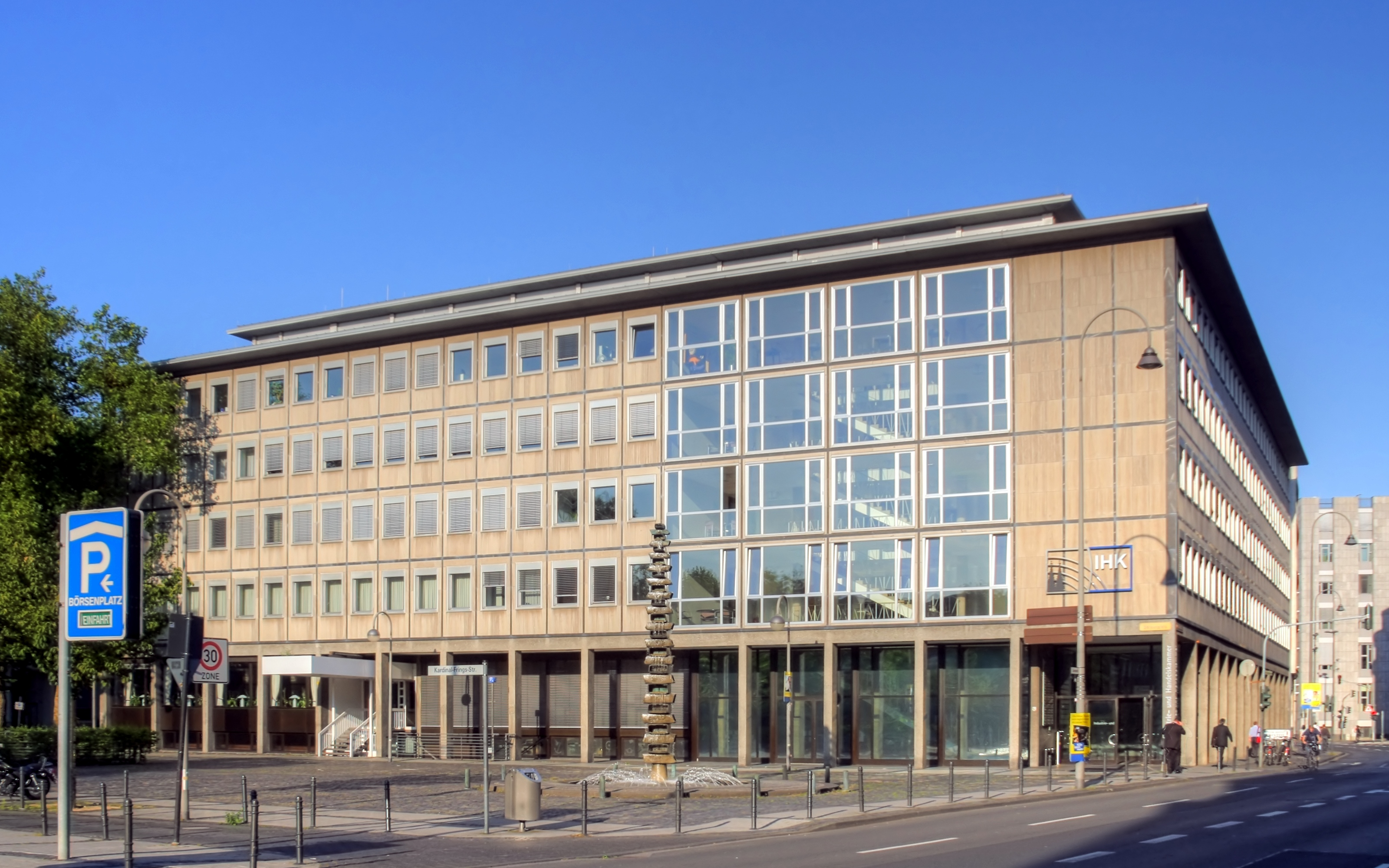 Industrie- und Handelskammer (IHK), Unter Sachsenhausen, Köln. Architekt: Karl Hell. Baujahr: 1950/51 This is a photograph of an architectural monument.